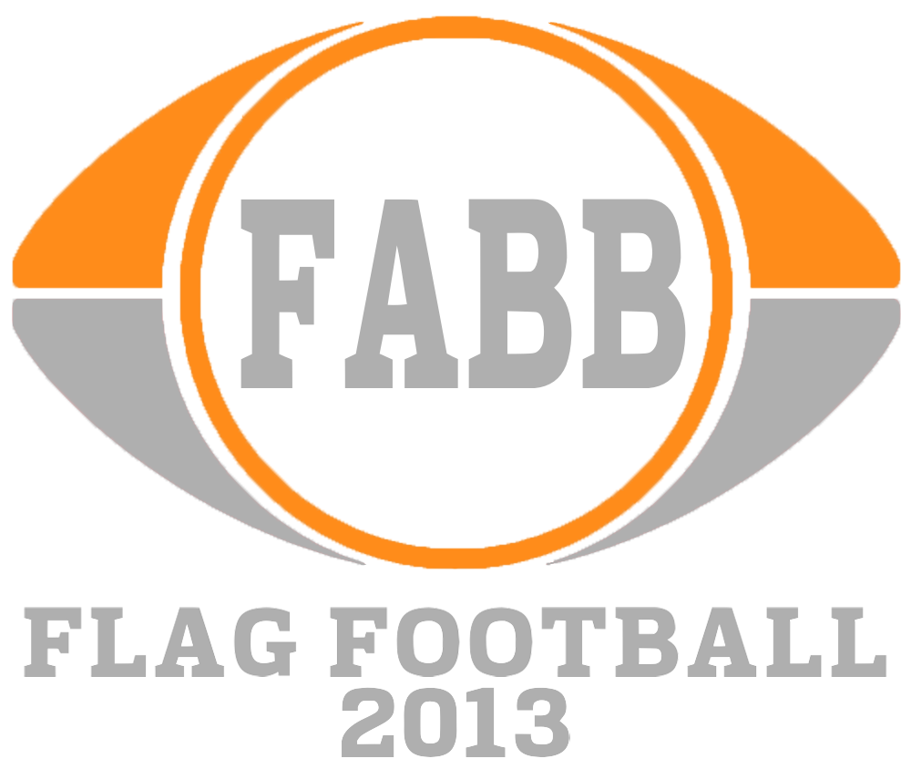 Logo Oficial de FABB 2013